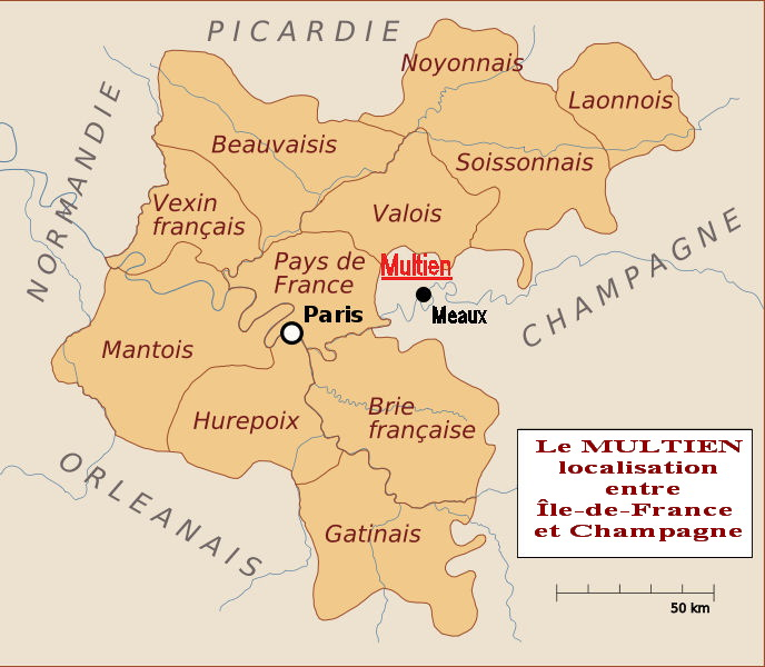 Région au nord-ouest de Meaux